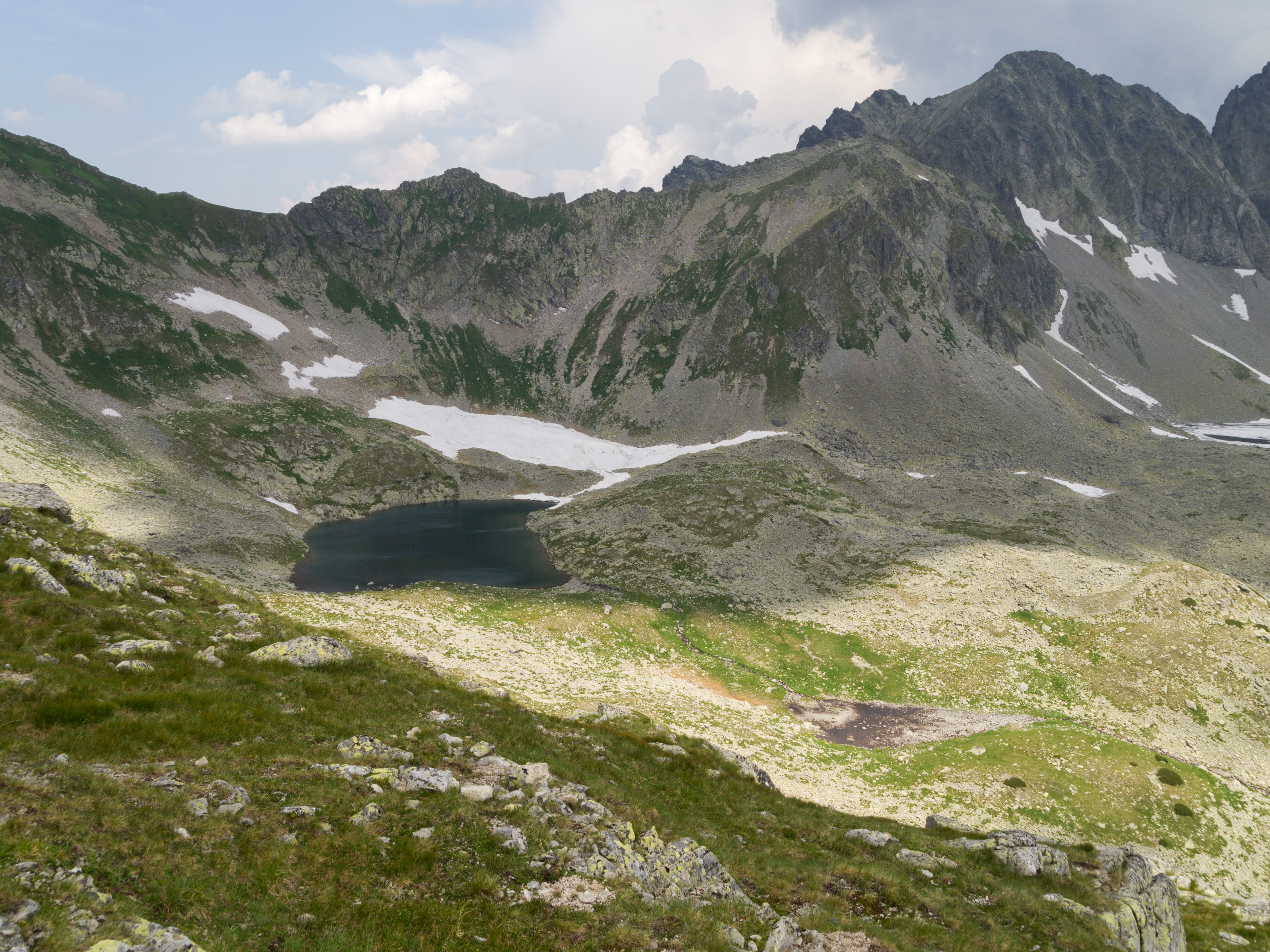 Pusty Staw i Puste Oko w Pustej Kotlinie.